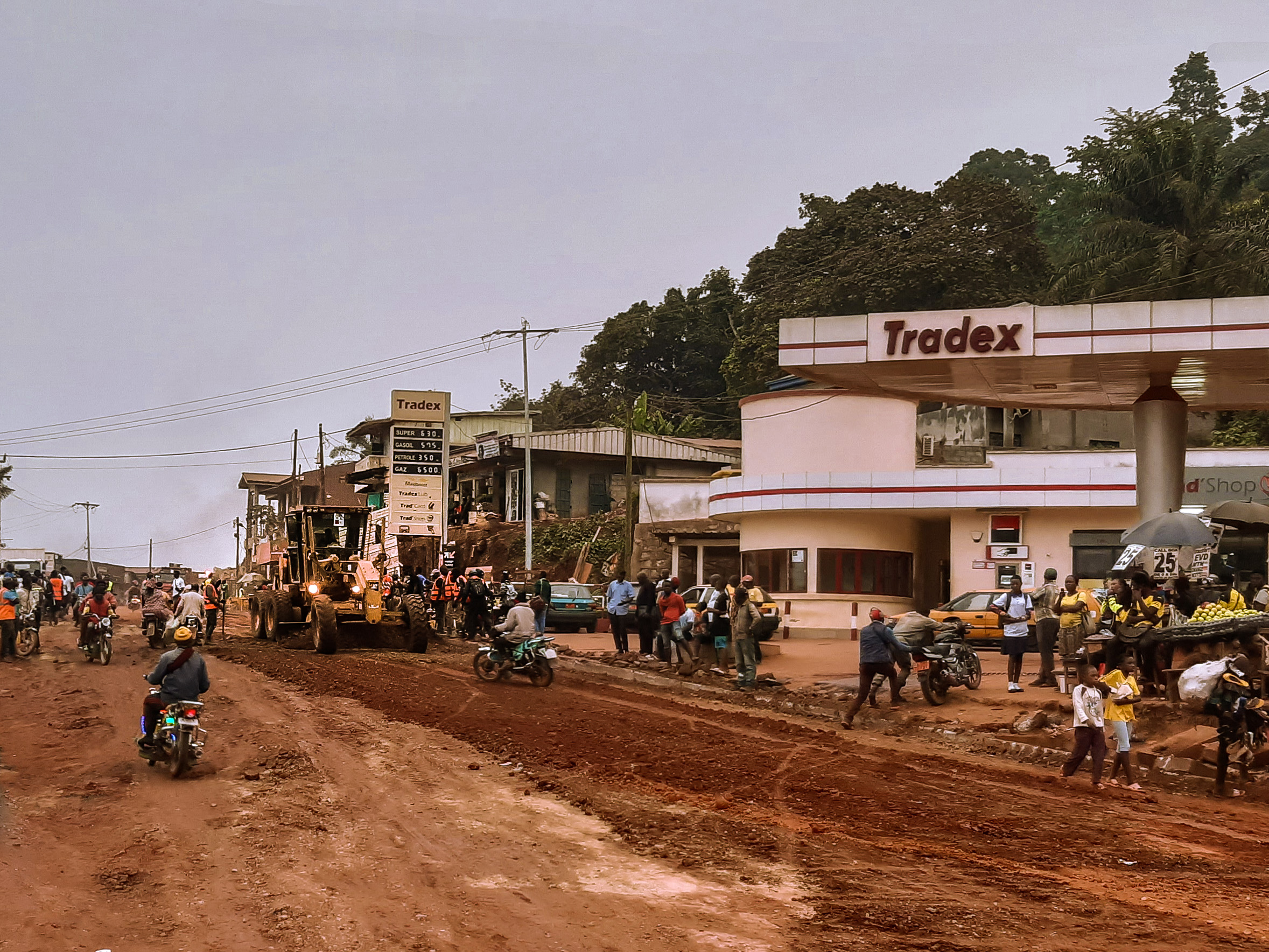 La circulation en ville est incessante et il n'est pas possible de fermer un tronçon pour réaliser un chantier. D'ailleurs, la signalisation et les zones de chantier ne sont pas respectées. Cela conduit les engins à évoluer au milieu de la circulation pour effectuer tant bien que mal leur travail, ce qui n'est pas sans effet sur le manque de durabilité de ces infrastructures. This is an image with the theme "Africa on the Move or Transport" from: Cameroon